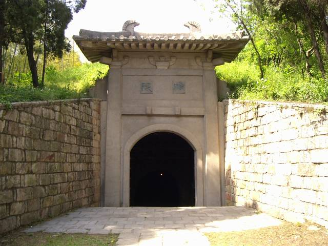 南唐二陵 順陵入口 2004年4月24日撮影 撮影者：権作 参照：